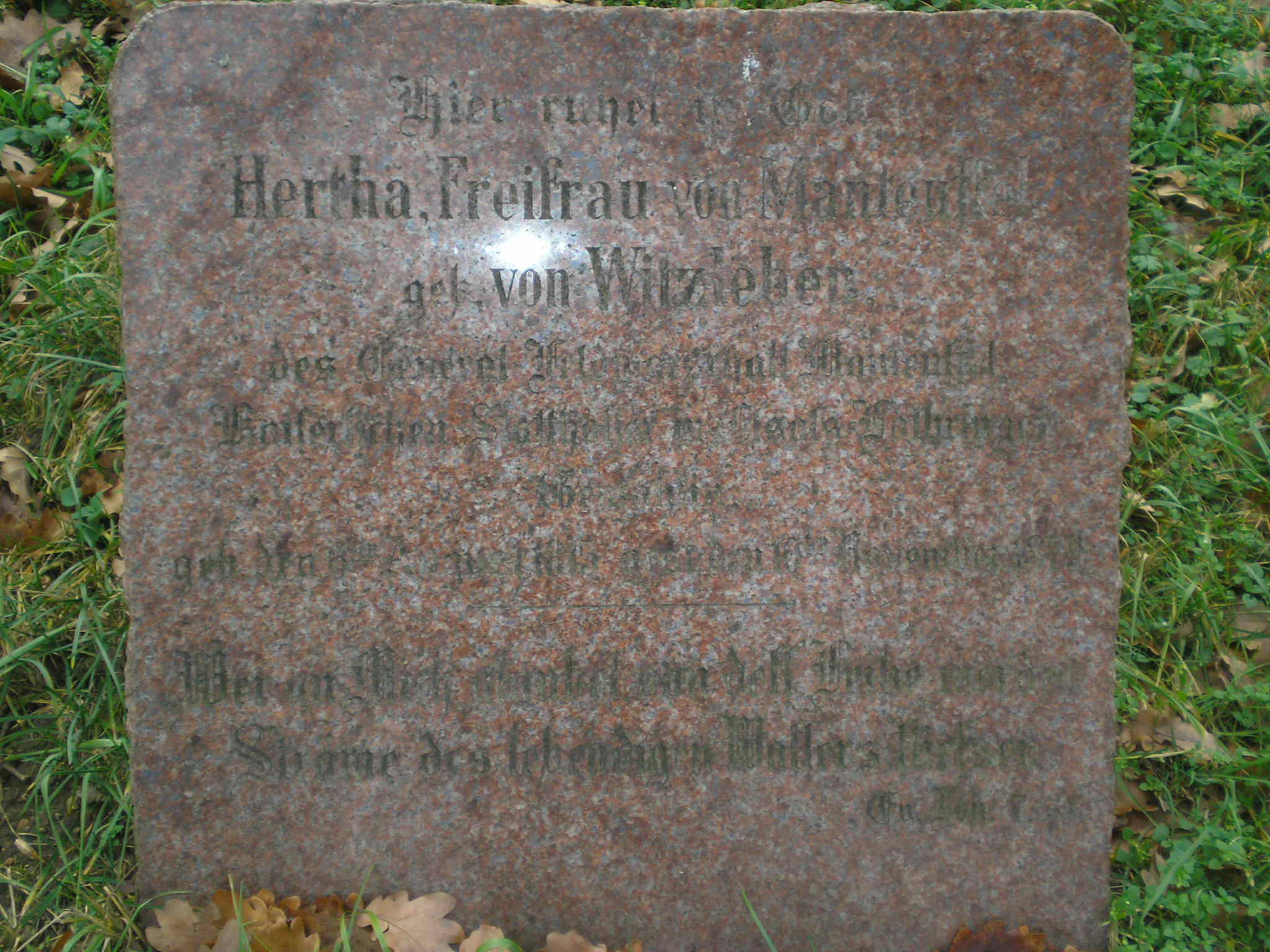 Grobowce rodziny Manteuffel w Toporowie